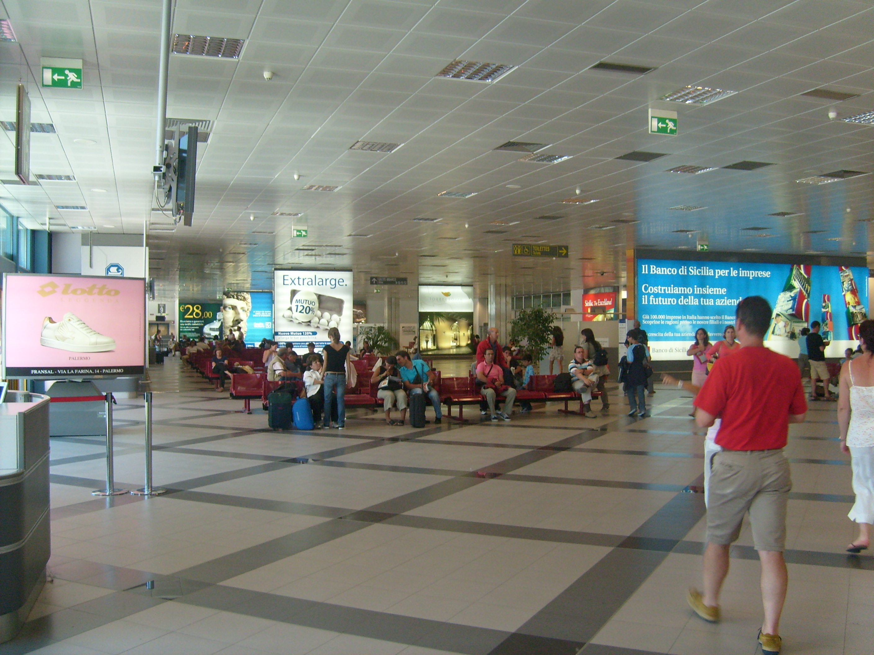 Autore: Andrea Baio, foto personale